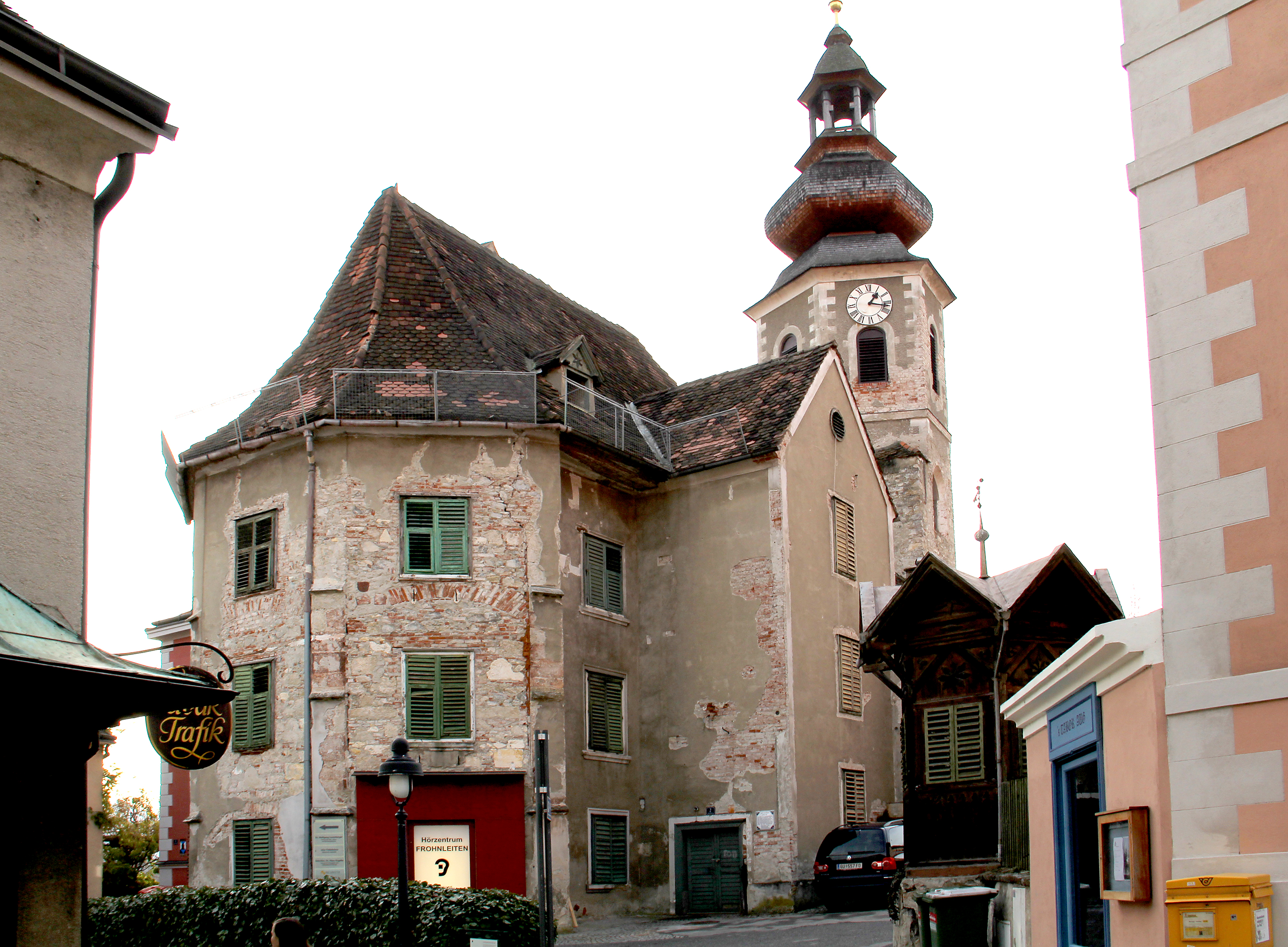 Ehem. Katharinenkirche in Frohnleiten